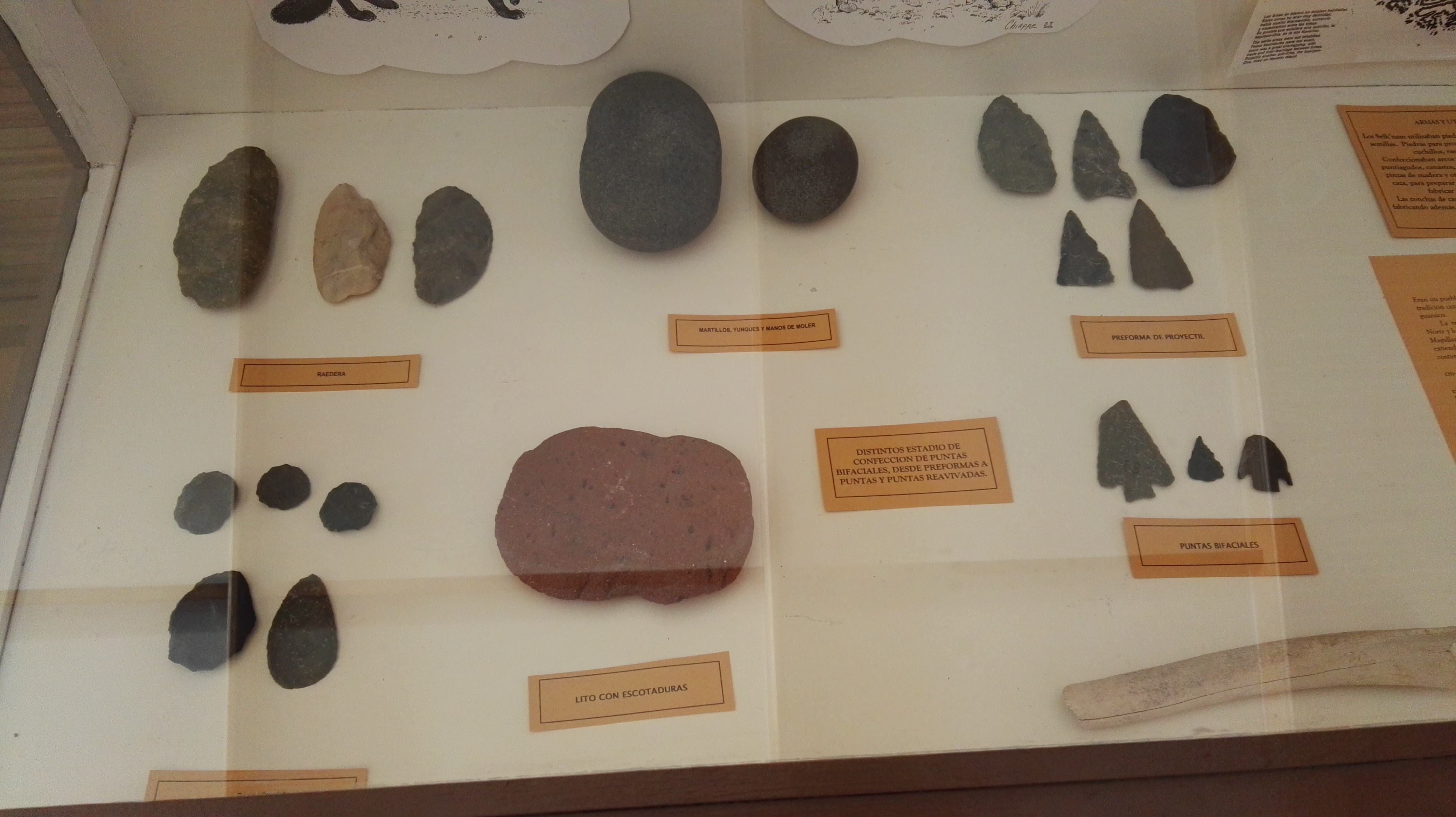 Ausstellungsstücke (Waffen und Werkzeuge) im Museo Municipal Fernando Cordero Rusque in Porvenir Chile